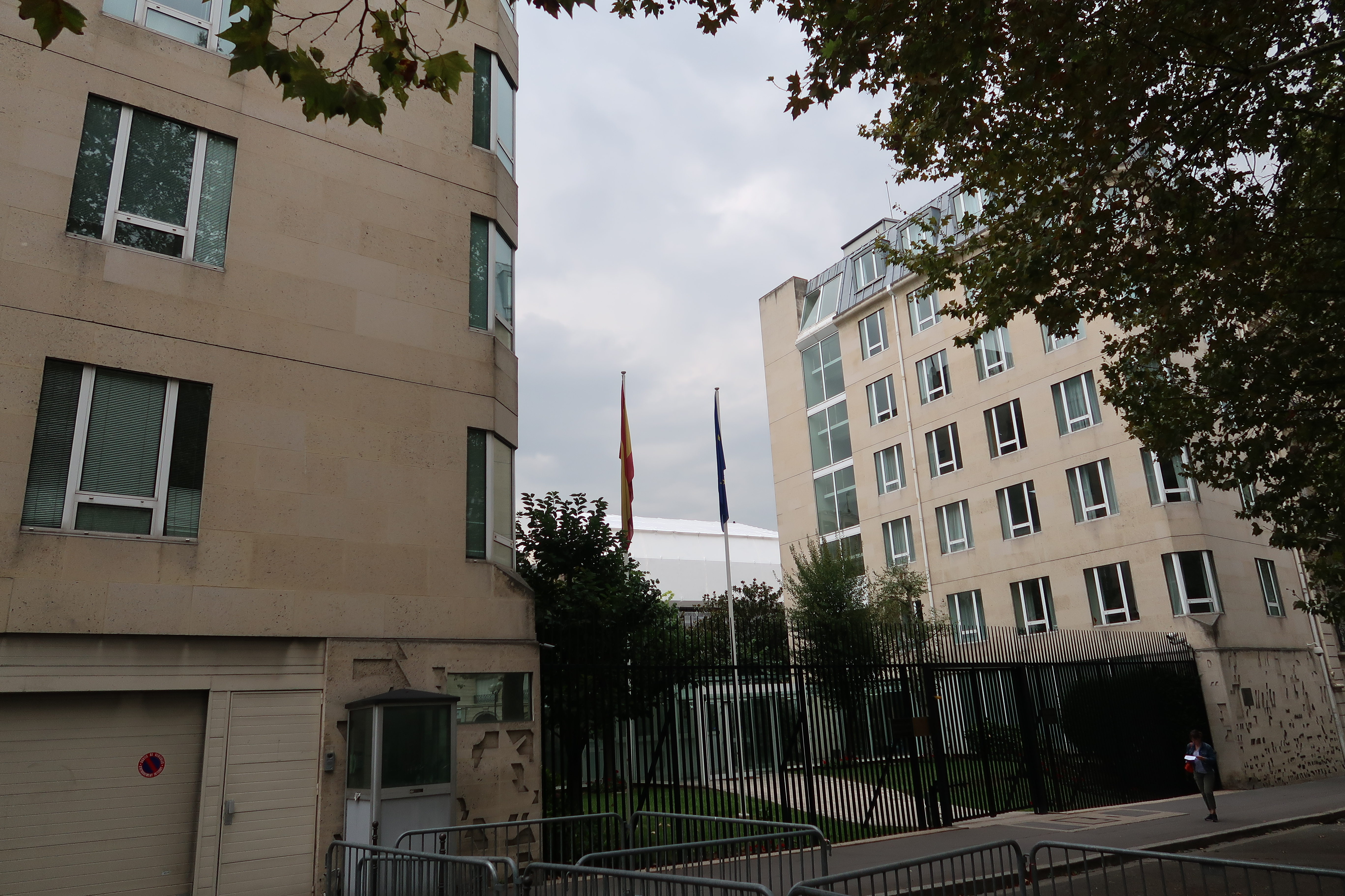 Ambassade d'Espagne en France, 22 avenue Marceau (Paris, 16e).